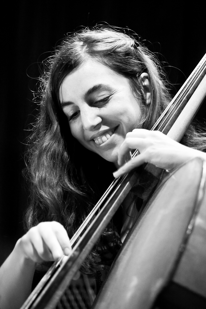 Sarah Murcia en concert au Studio de l'Ermitage (Paris 20), avec le groupe de François Ripoche "Francis et ses peintres", le 7 octobre 2008